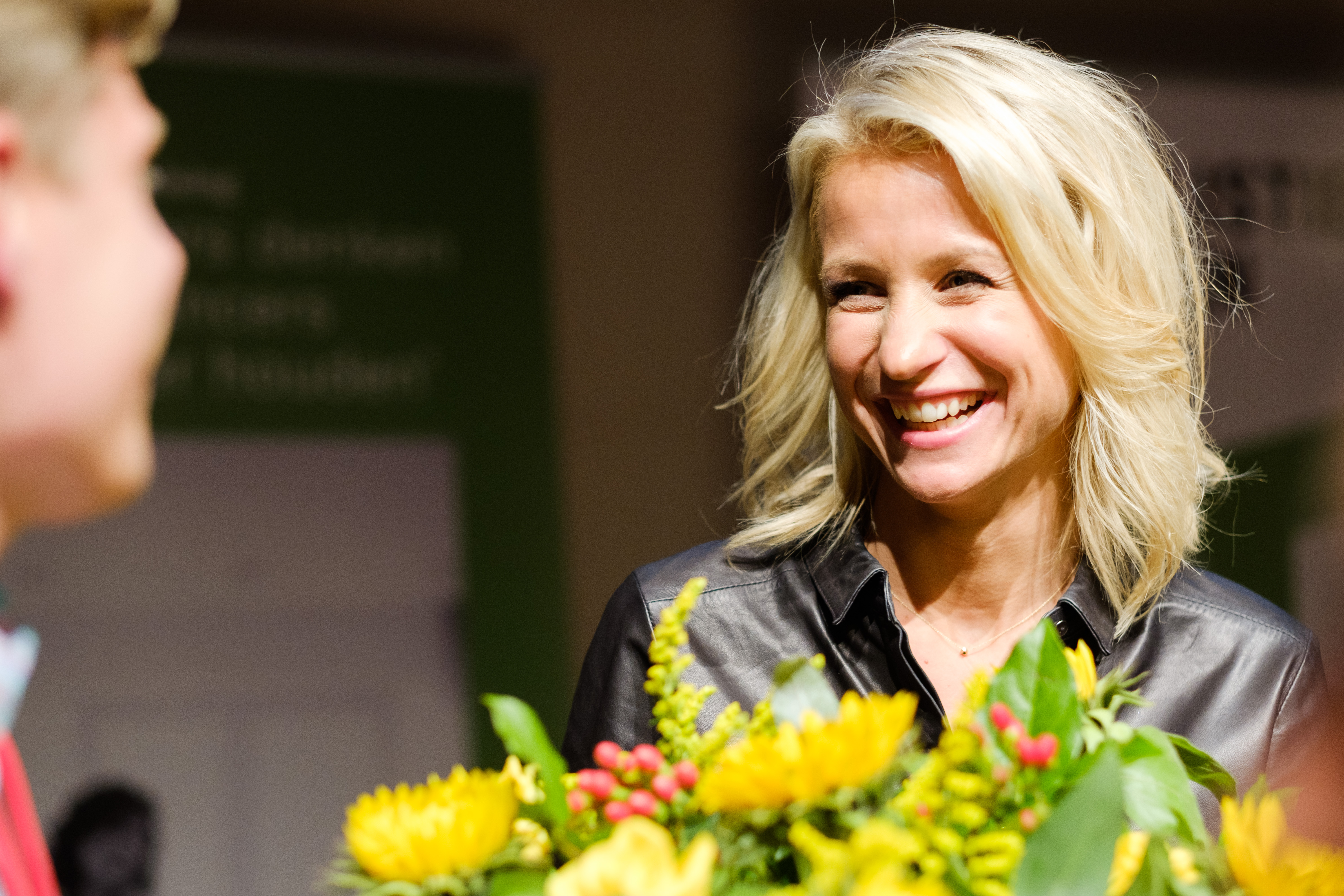 Het thema van de elfde editie van het Festival van de Journalistiek was: Innovatie. Oftewel: welke nieuwe technologieën en vertelvormen hebben invloed op de journalistiek? Tijdens het festival konden bezoeker alles over drones, blockchain, virtual reality, mojo en nog veel meer innovatieve journalistiek horen en beleven.